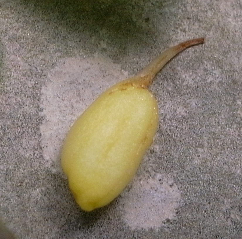 Orobanche hederae, Buskett Gardens, Malta Fructus